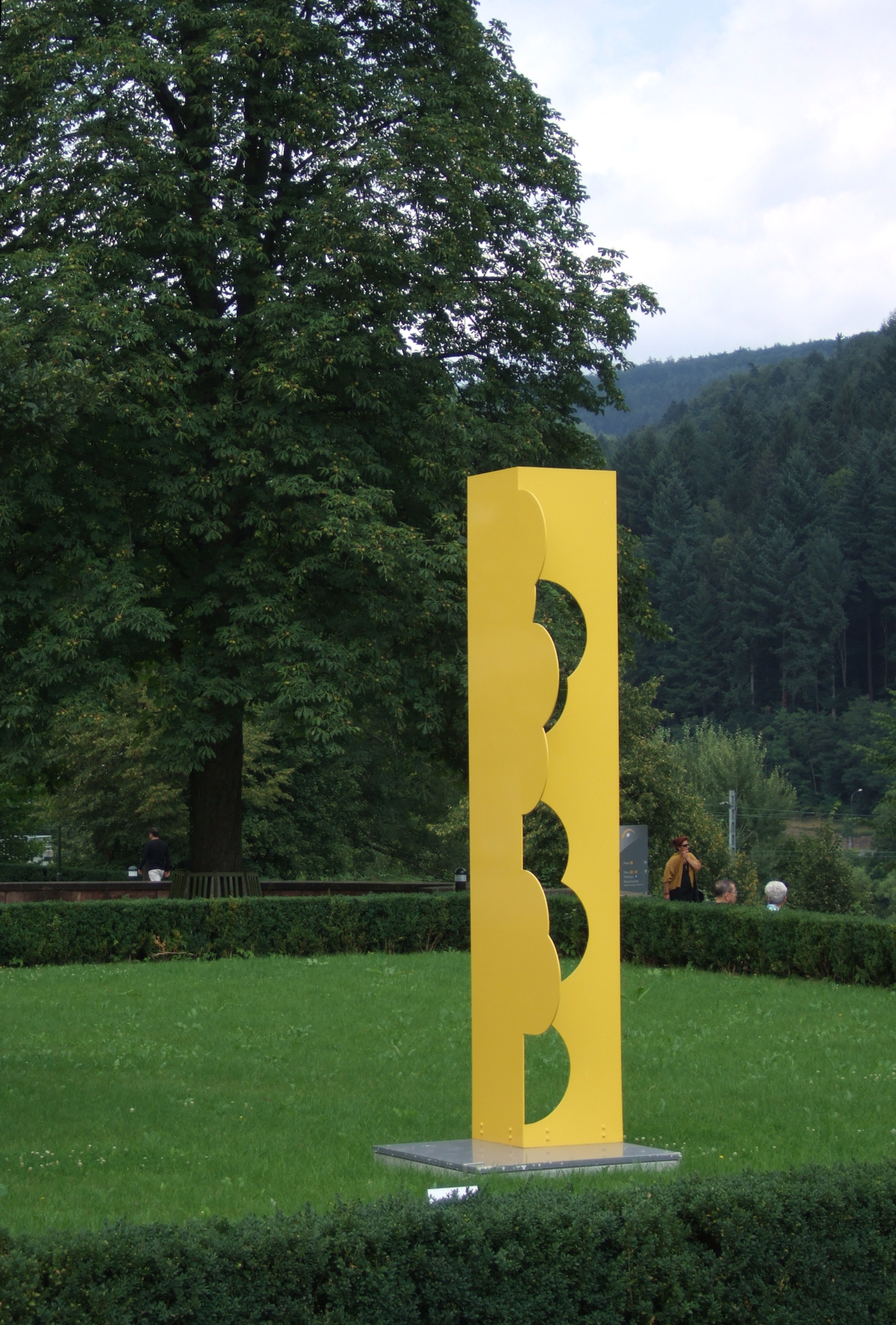 Gottfried Honegger: Gelbe Pliage C115 (2001). Standort: Skulpturenpark Heidelberg